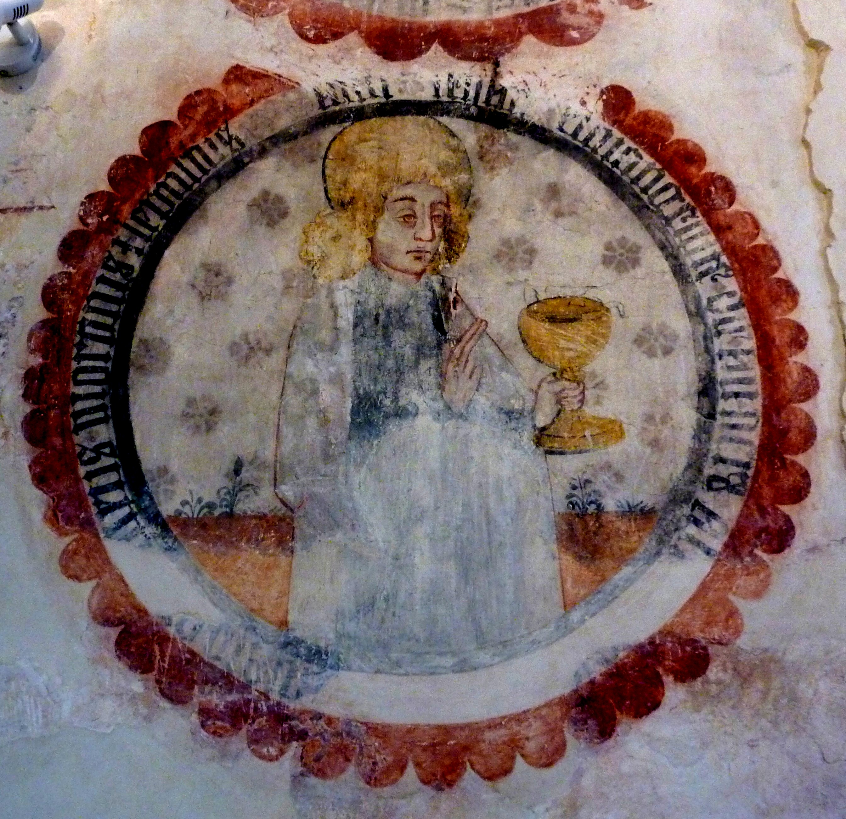 Médaillon représentant Saint jean l'Evangéliste dans le choeur de l'église